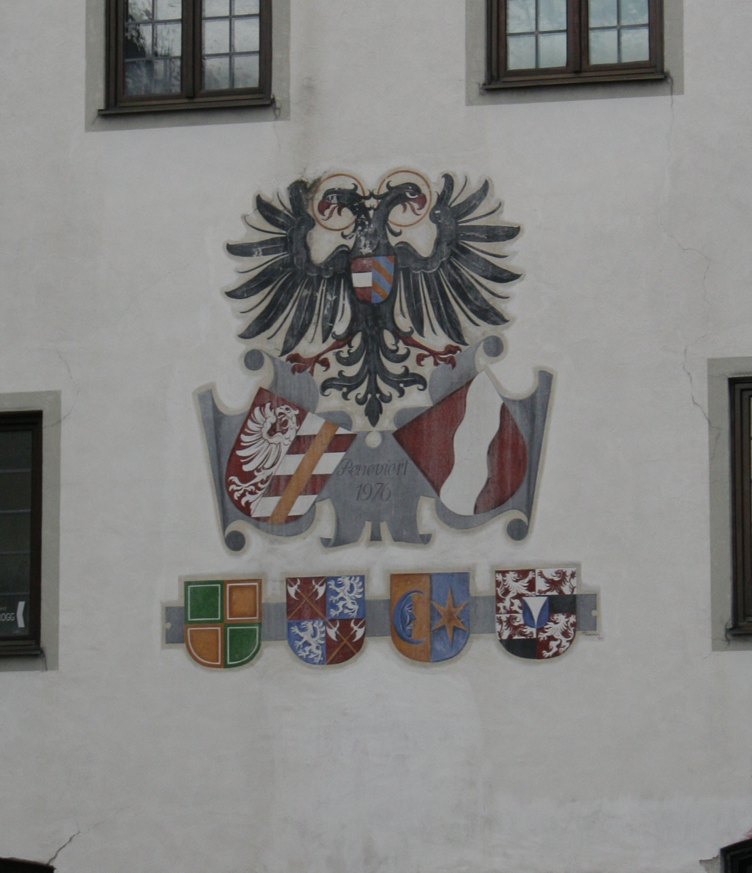 Altes Rathaus Krumbach: Fassadenmalerei an der Westfassade: Reichsadler mit Herzschild Österreich (Bindenschild)/Burgund Wappen Landkreis Günzburg und Stadt Günzburg Familienwappen der Ellerbach, der Lamparter von Greifenstein, der Weber von Pisenberg und der Grafen von Liechtenstein-Kastelkorn